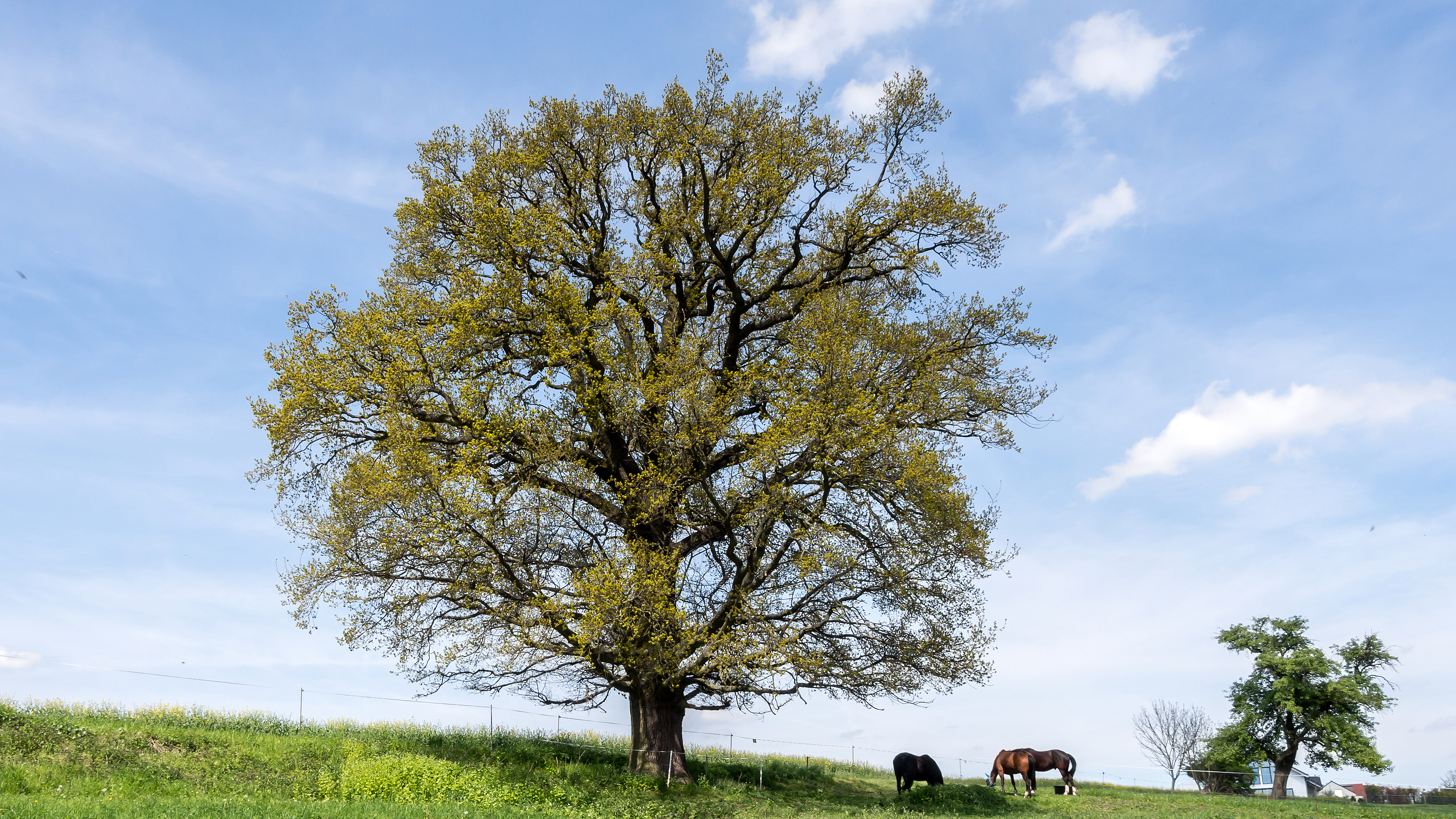 Stieleiche Doc.-Nr. 2006-04 Cospeda IV